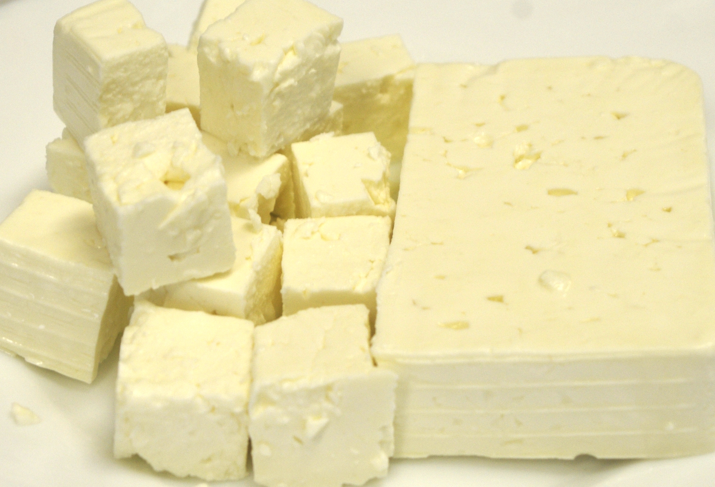 Feta siers